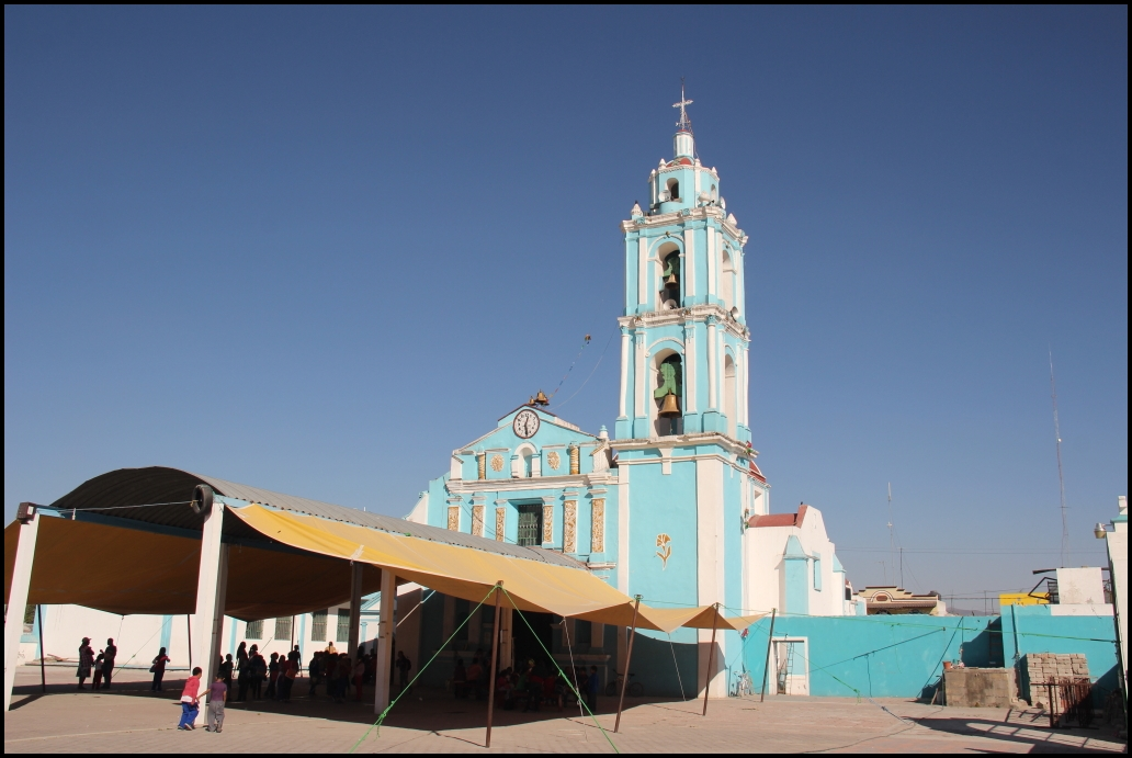 Templo de Santa Catarina,Cuapiaxtla de Madero,Estado de Puebla,México.